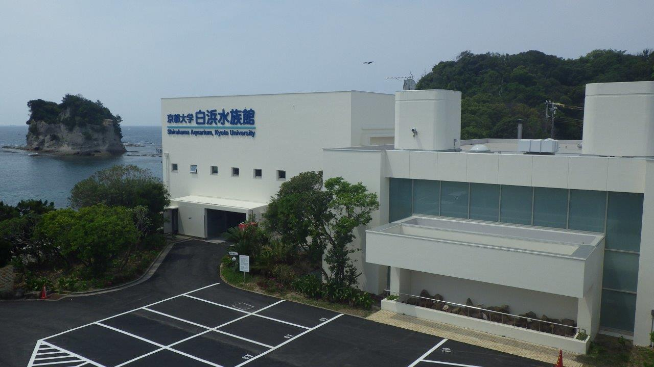 京都大学白浜水族館外観